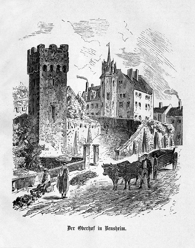 Ansicht des Oberhofs in Bensheim, 1883